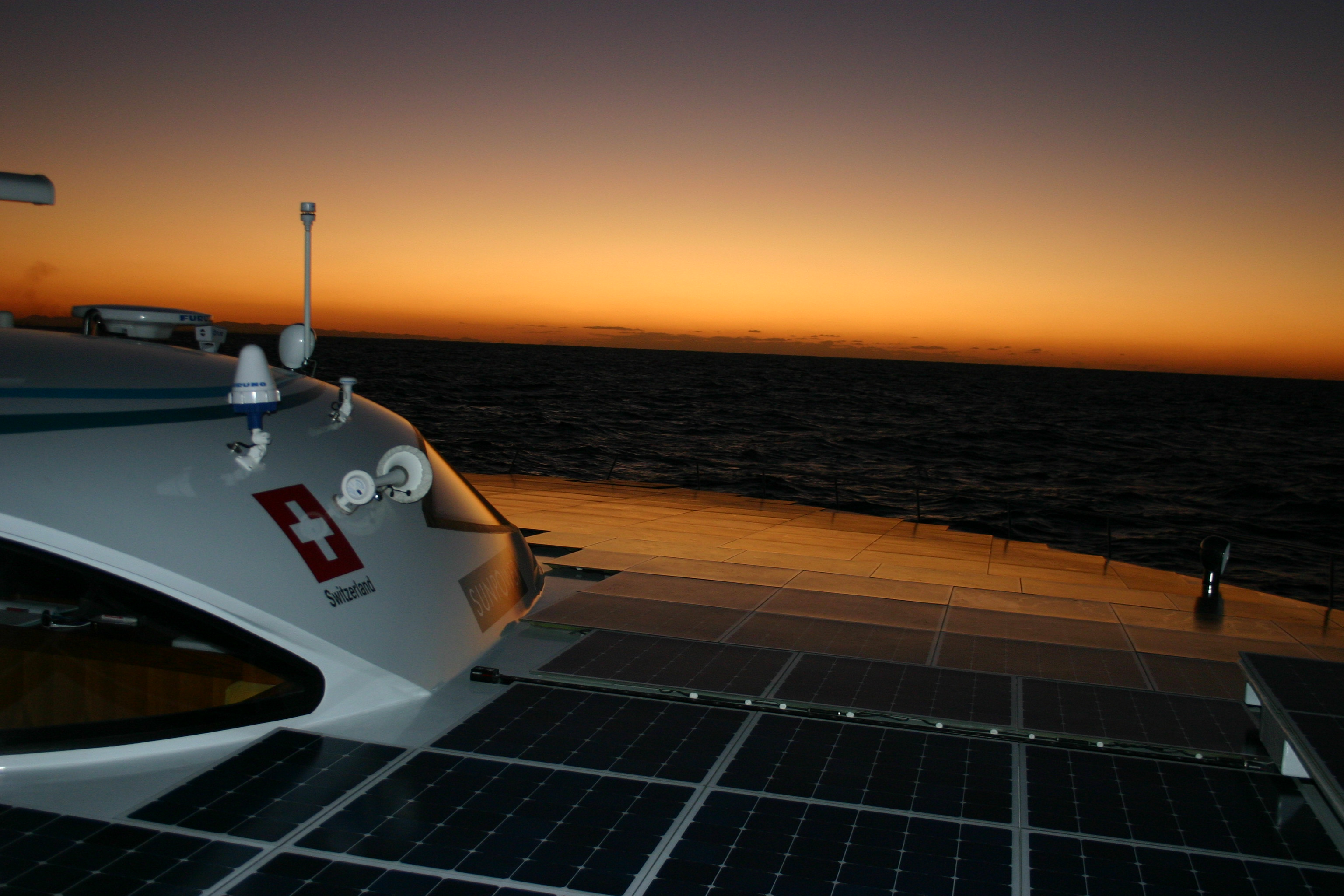 Le trimaran solaire Planetsolar